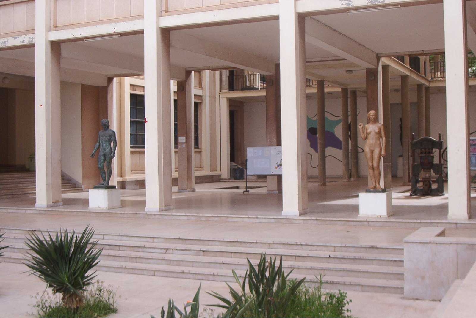 Oeuvres de Paul Belmondo à l'Ecole des Beaux-Arts d'Alger